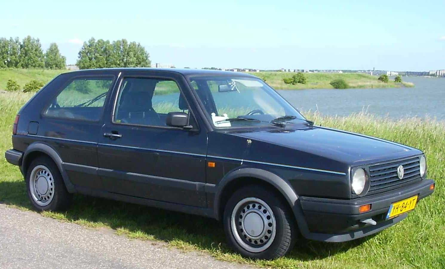 eigen werk